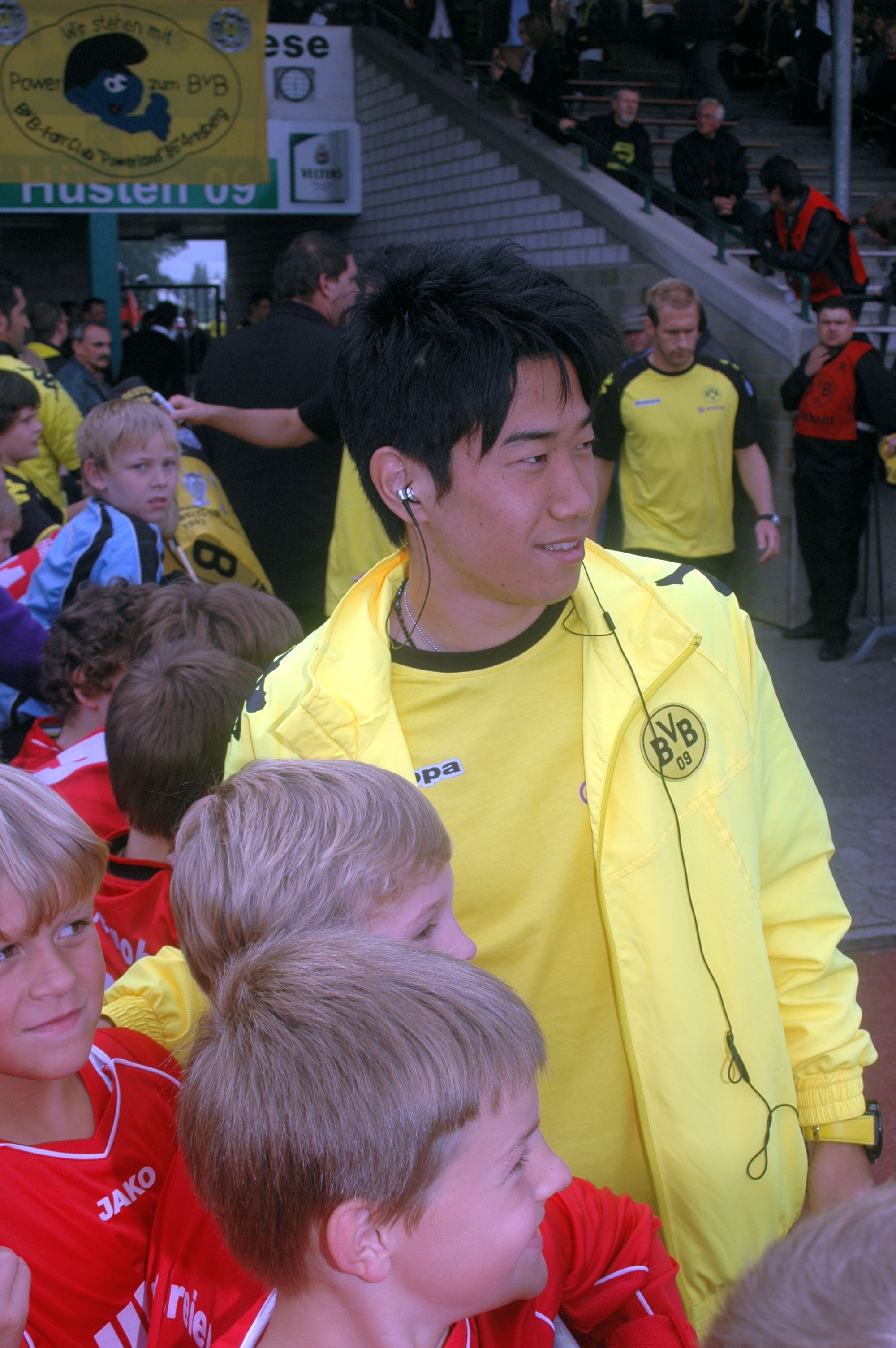 Shinji Kagawa